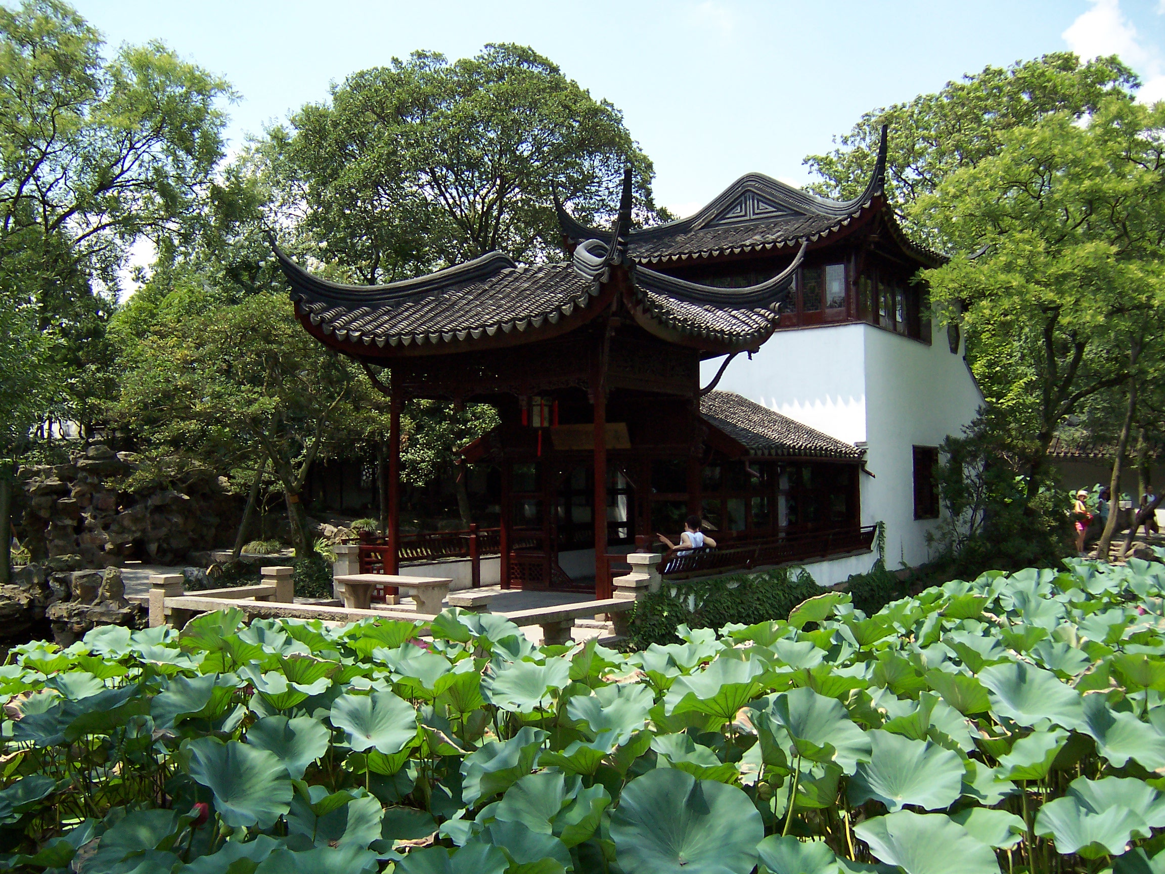 Xiangzhou (Îlot aux parfums) du Zhuozhengyuan